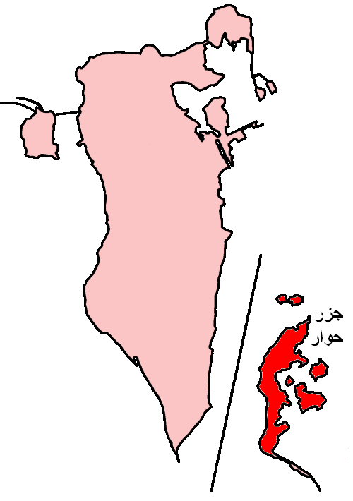 موقع جزر حوار الجغرافي